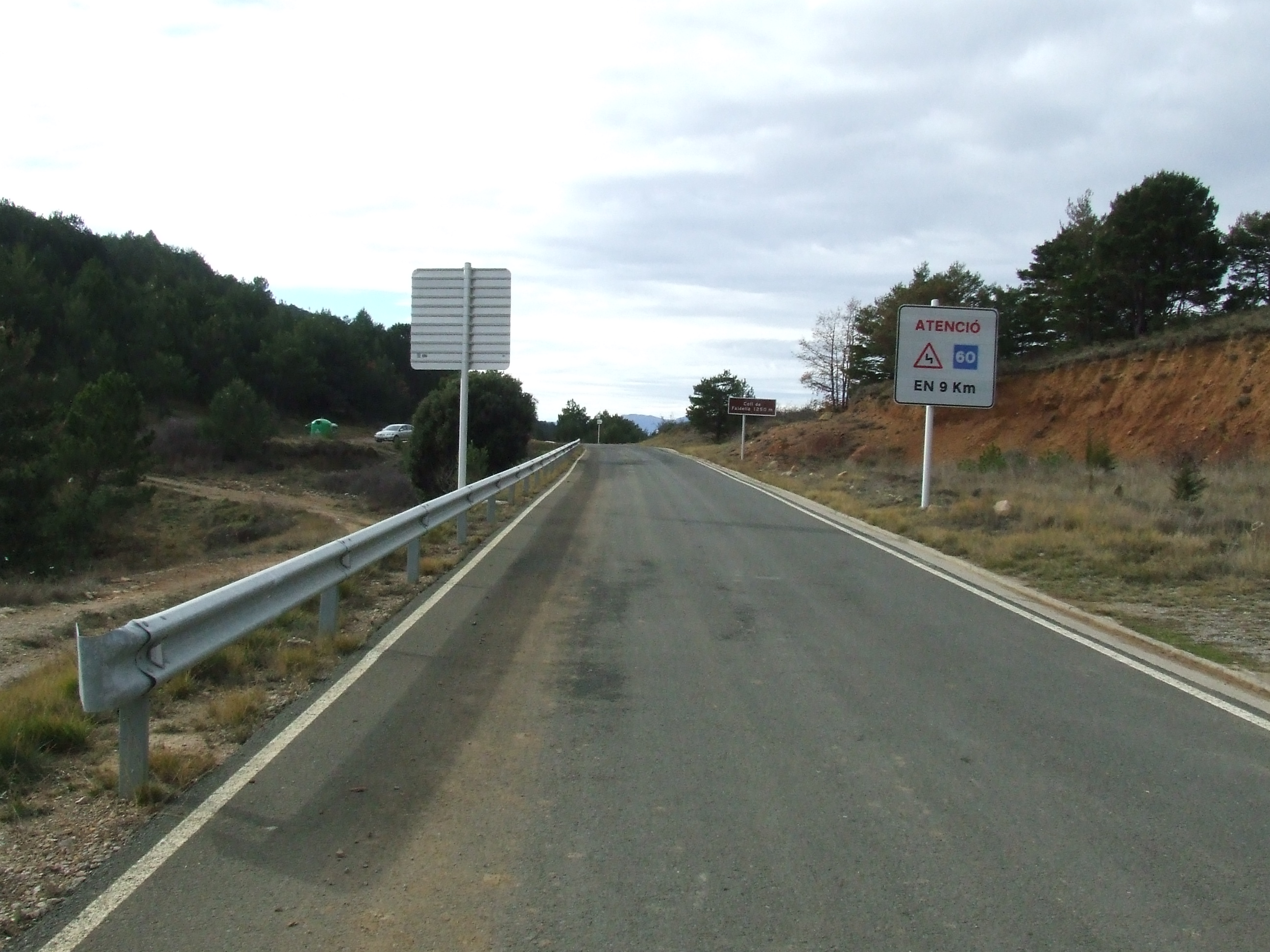 El Coll de Faidella (Abella de la Conca, Pallars Jussà)